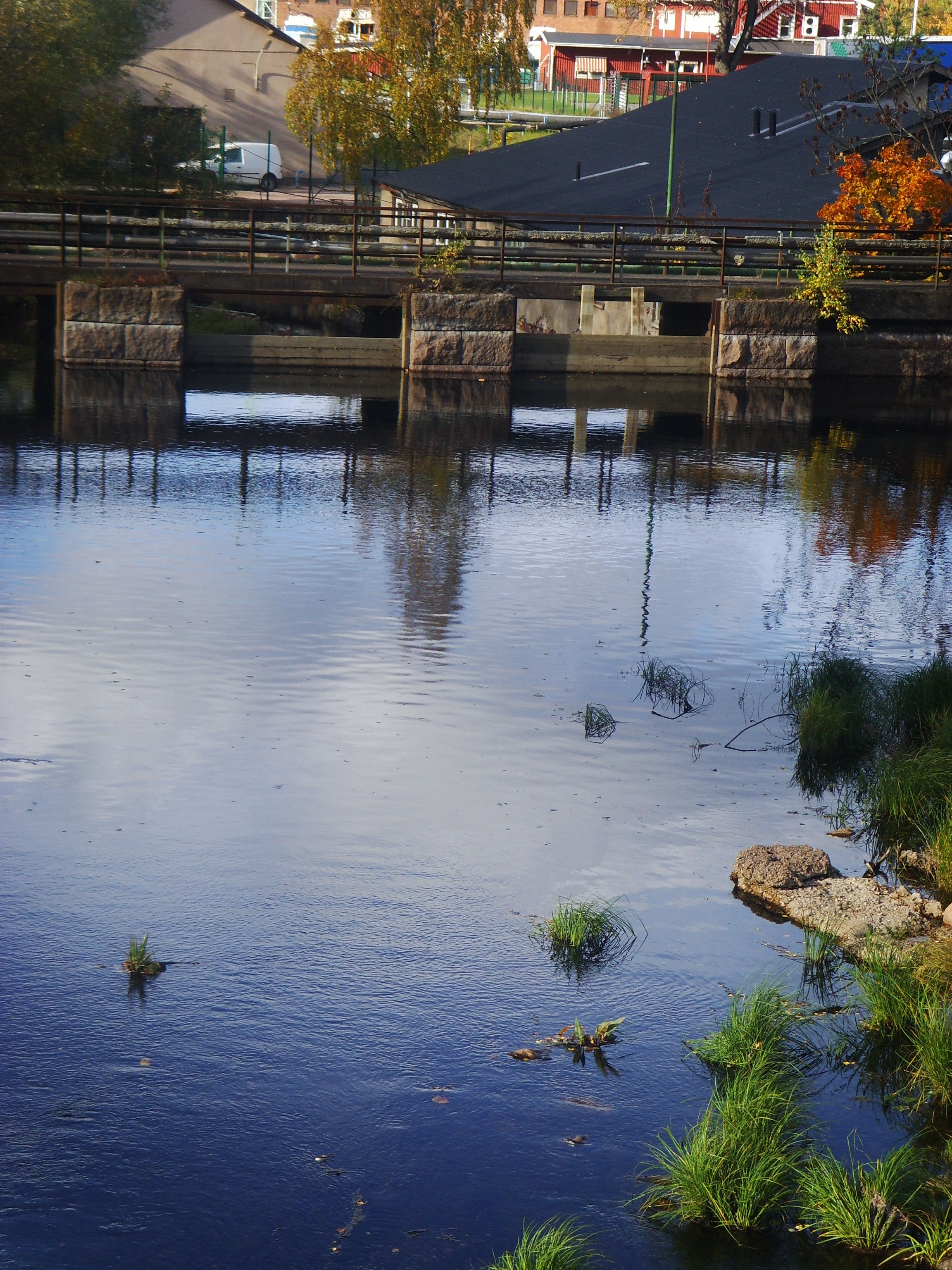 Bruksområdet i Boxholm.